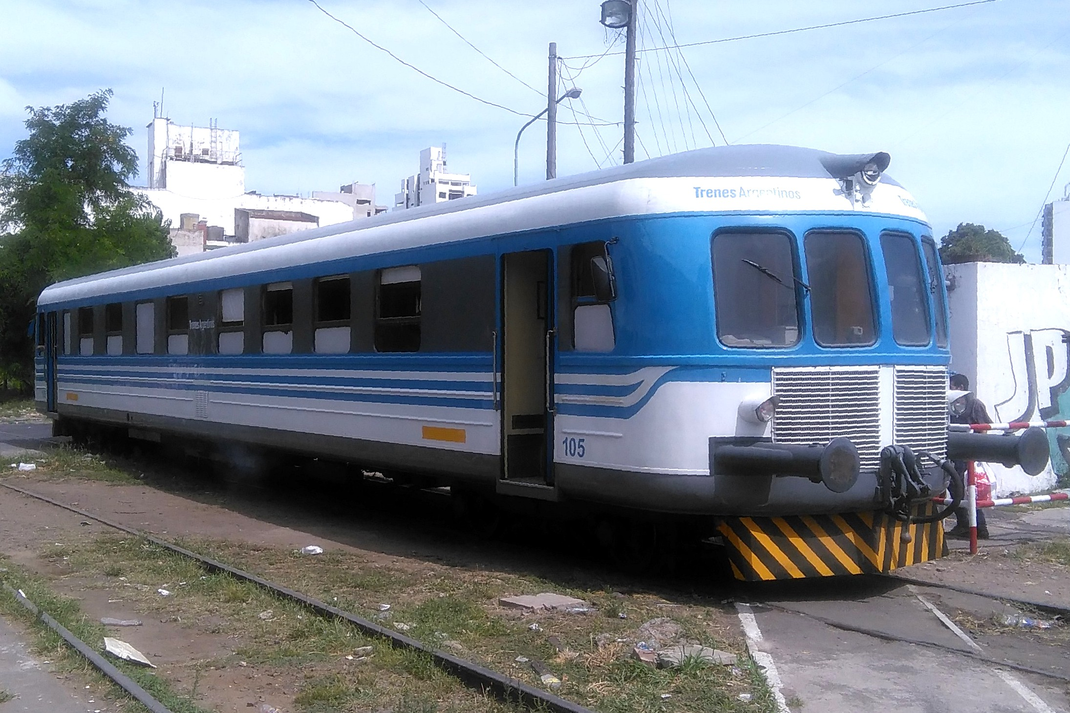 Tren Universitario de La Plata